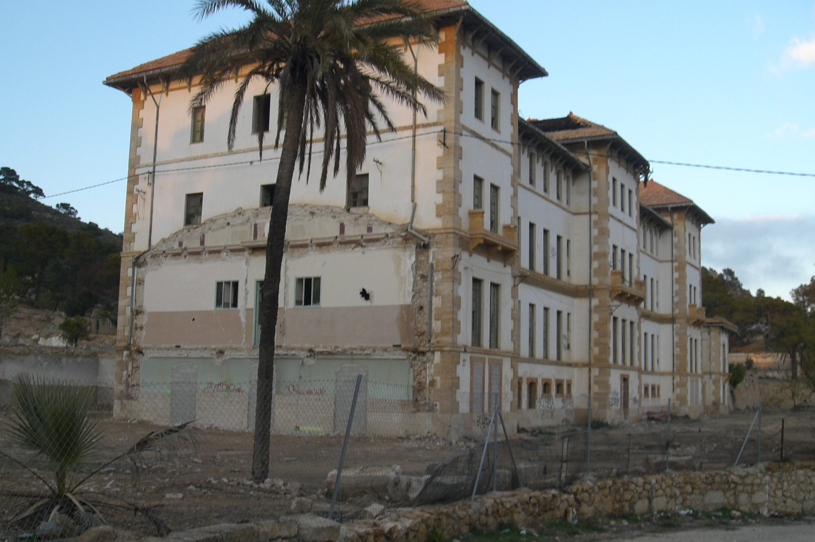 Aigües (Alacantí). Antic centre infantil de turbeculossos.